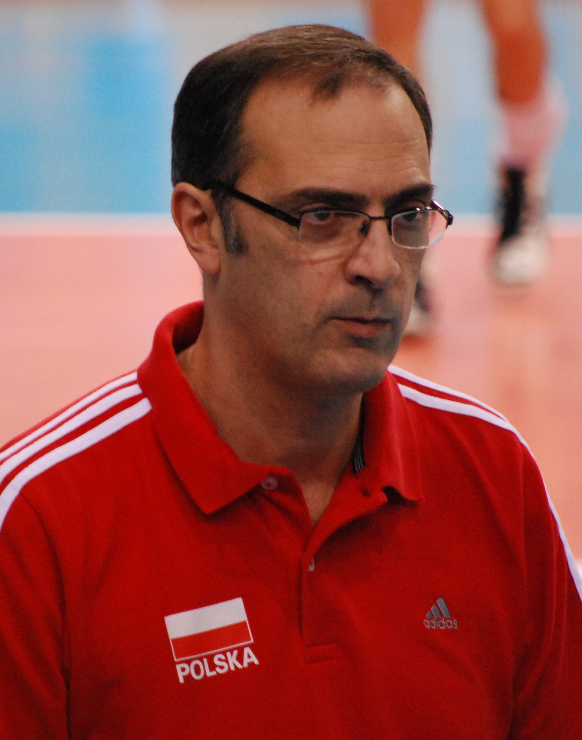 Daniel Castellani, trener Polskiej Reprezentacji siatkarzy w latach 2009-2010 .